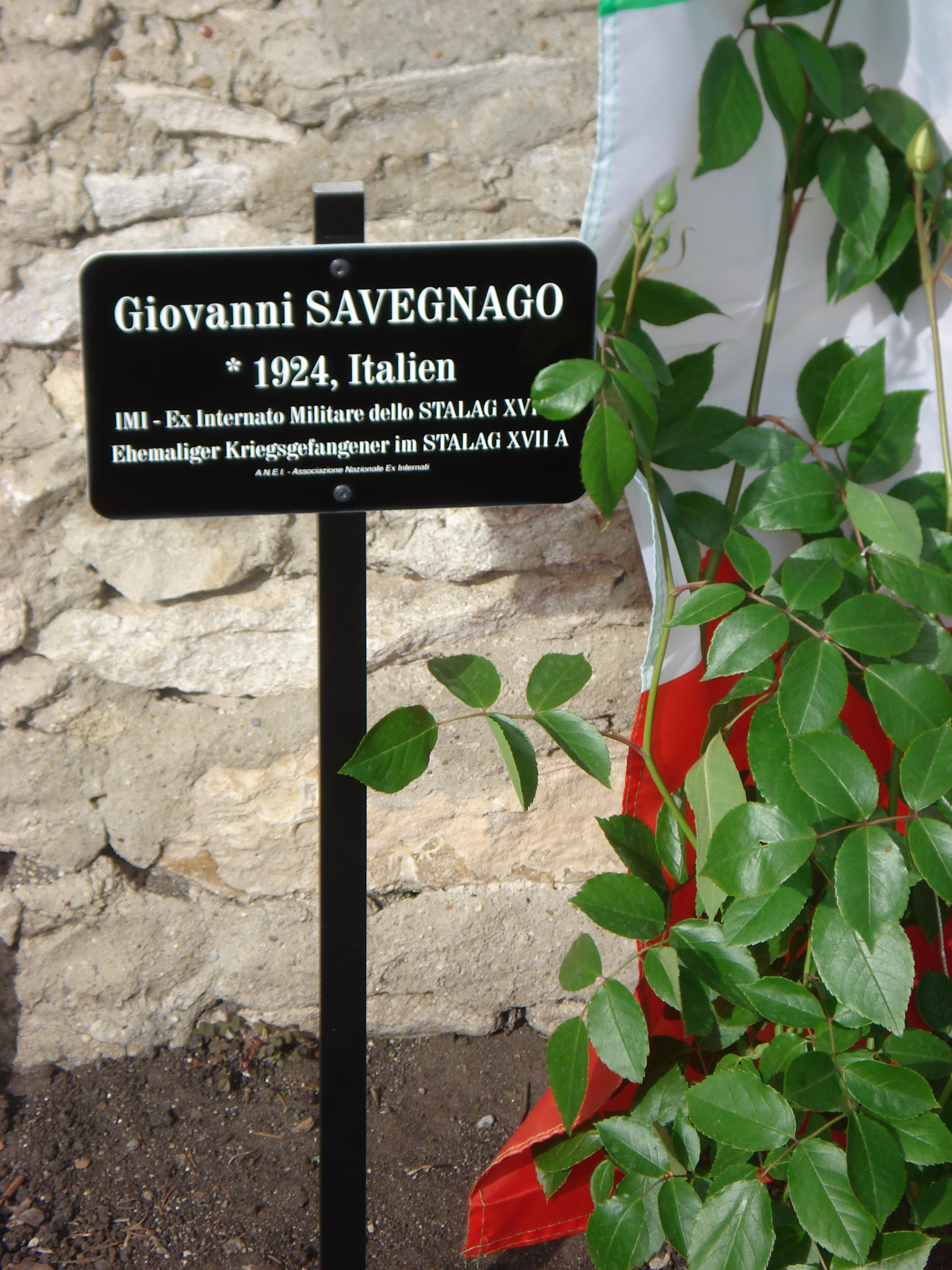 Der Italiener Giovanni Savegnano, * 1924, jahrelang im Kriegsgefangenenlager Kaisersteinbruch, besucht Kaisersteinbruch. Bei der "Italien"-Länderplatte des Europabrunnens, im Rosarium wird eine Erinnerungstafel angebracht.